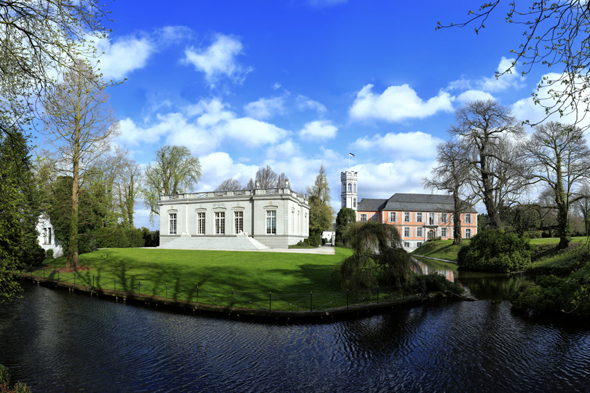 Der alte Turm wurde im Jahr 2013 neugebaut und eingeweiht. Dies ist das neue Panorama Bild von Schloss RurichThis is a photograph of an architectural monument.It is on the list of cultural monuments of Hückelhoven